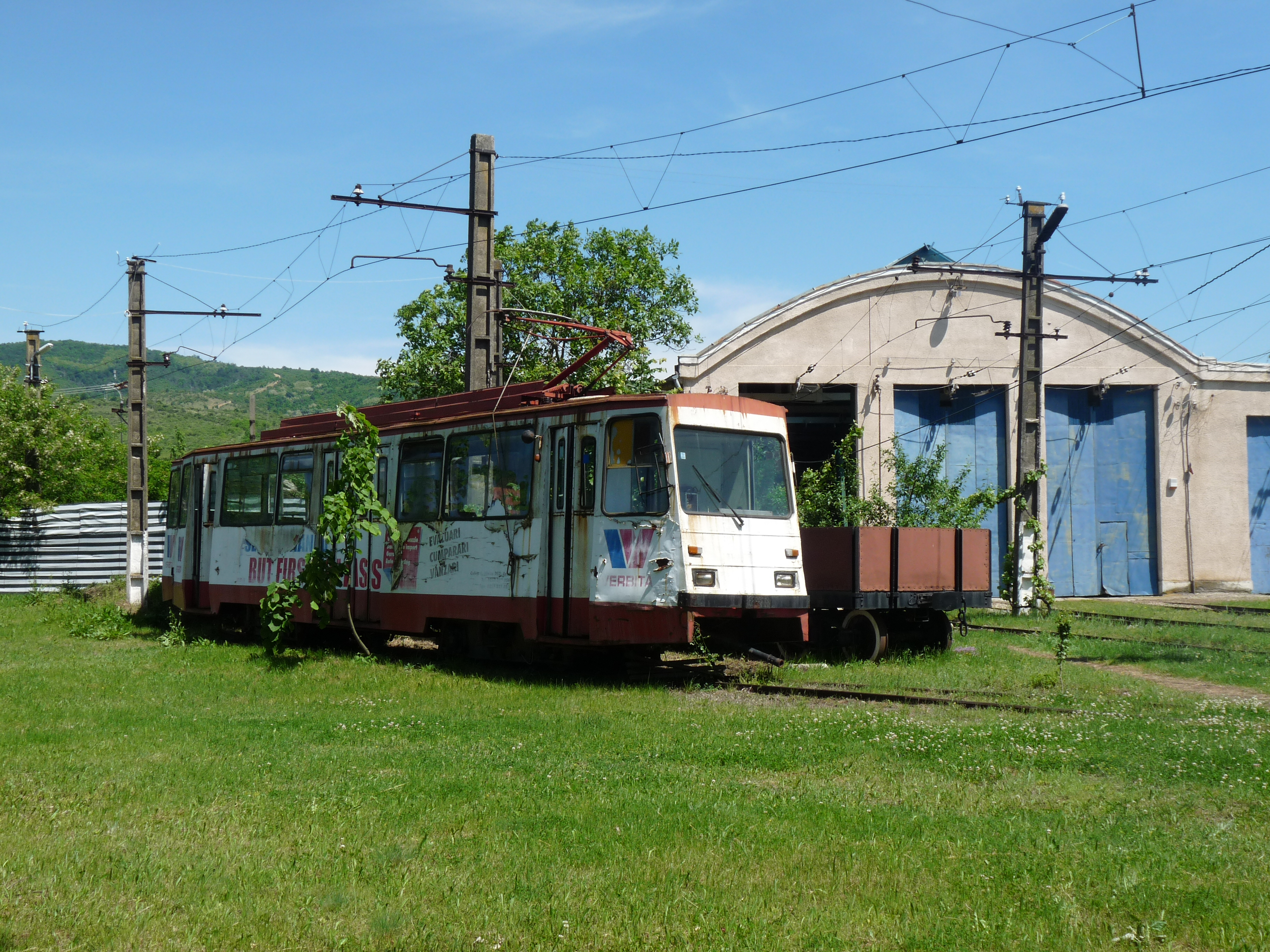 Ghioroc tramstelplaats heeft alleen historisch trammaterieel